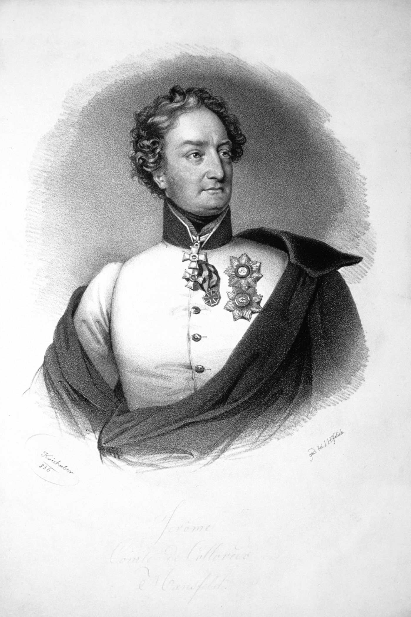 Hieronymus Colloredo-Mansfeld, Lithographie